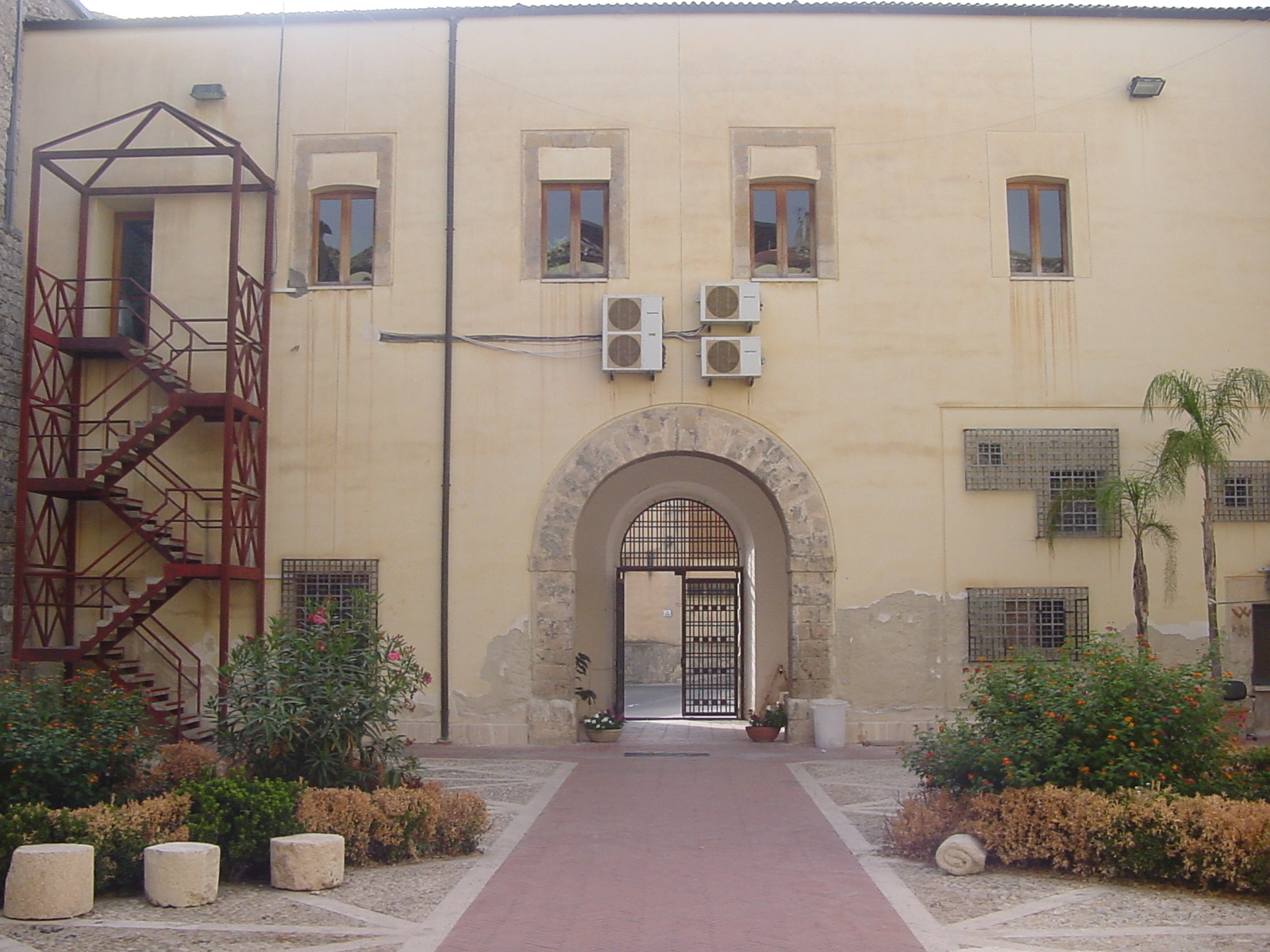 Atrio del Palazzo Municipale